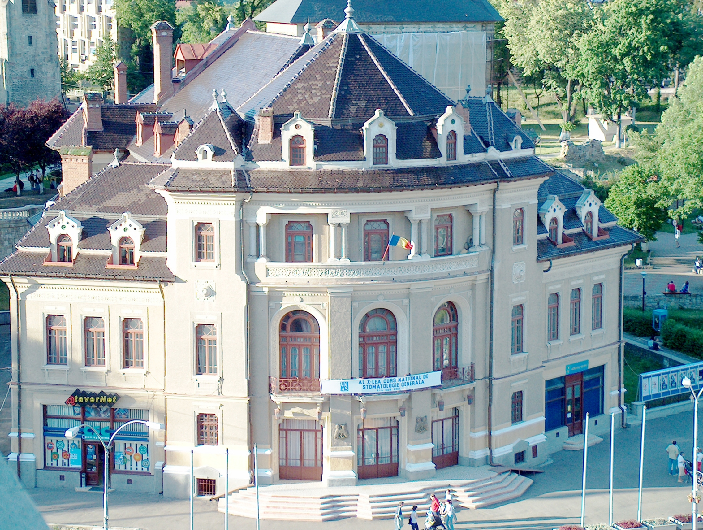 Clădirea Teatrului Tineretului din Piatra Neamţ